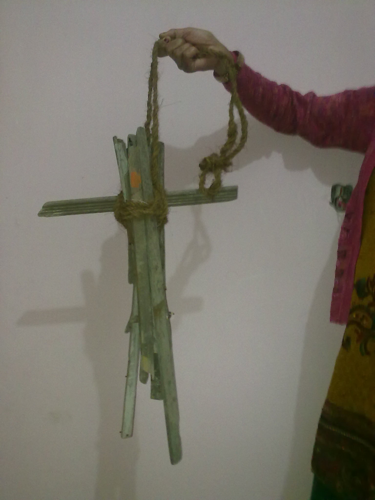 भेलू, गढ़वाल में दीपावली की रात्रि को घुमाया जाने वाला पारम्परिक अग्नि खेल औजार